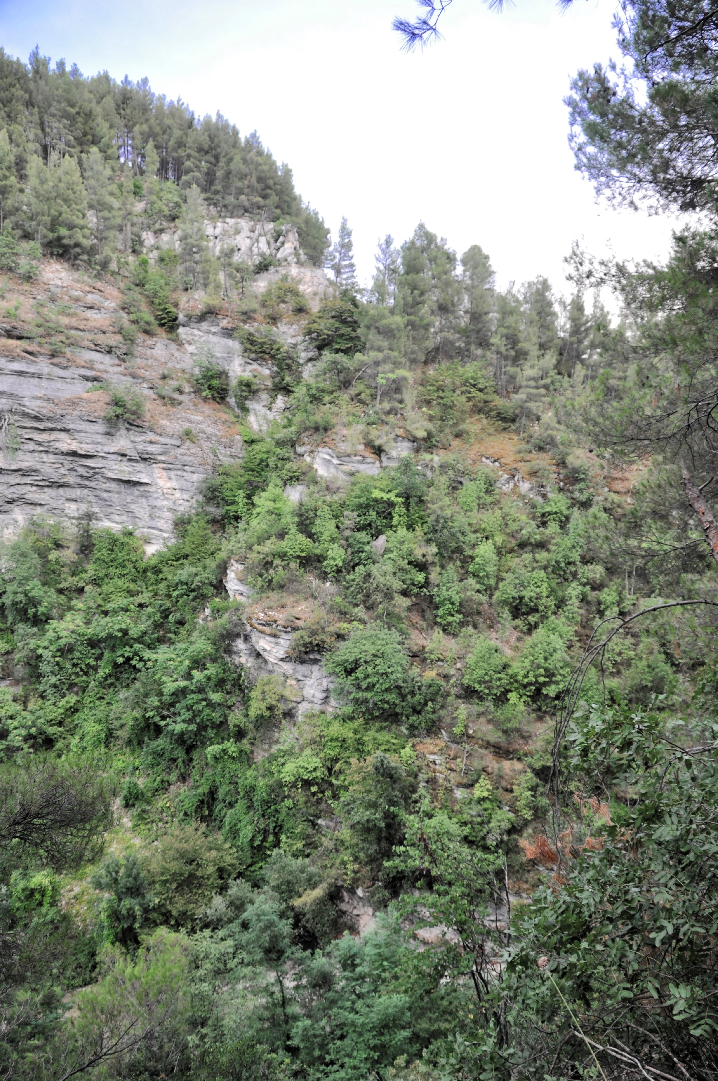 Valle dell'Orta 2013